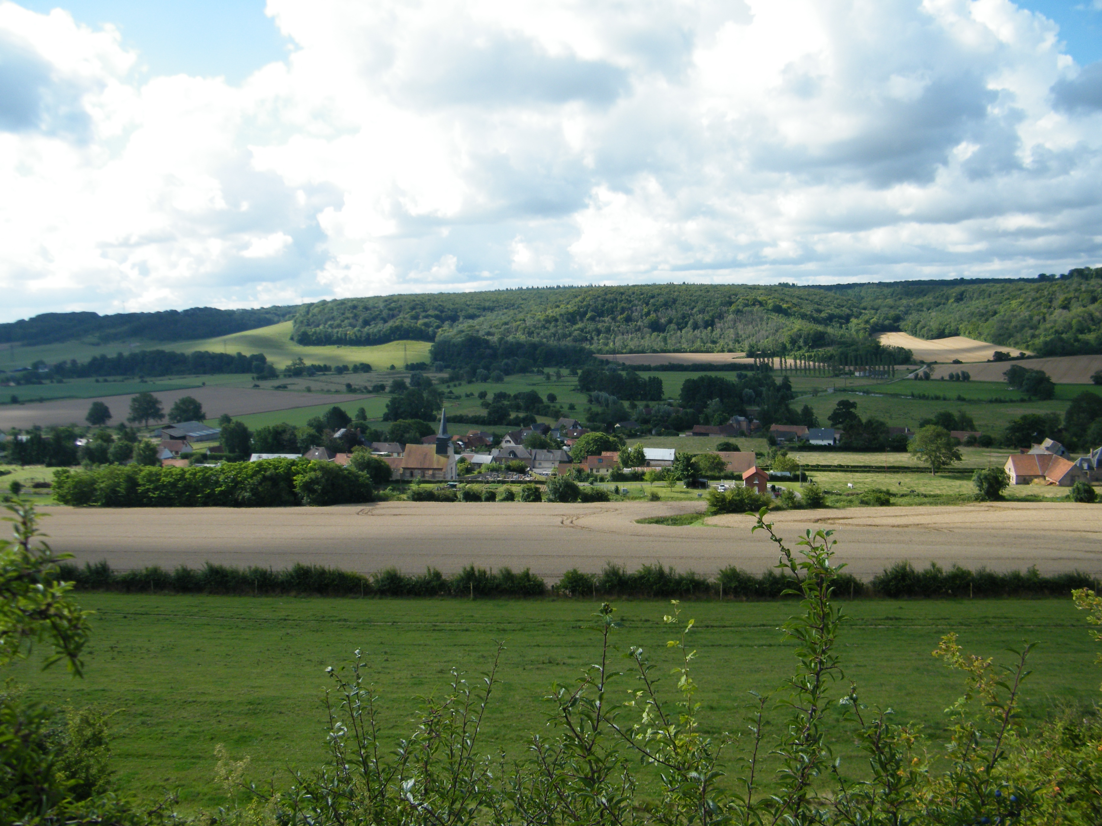 Sauchay, Seine-Maritime, France, vue du centre